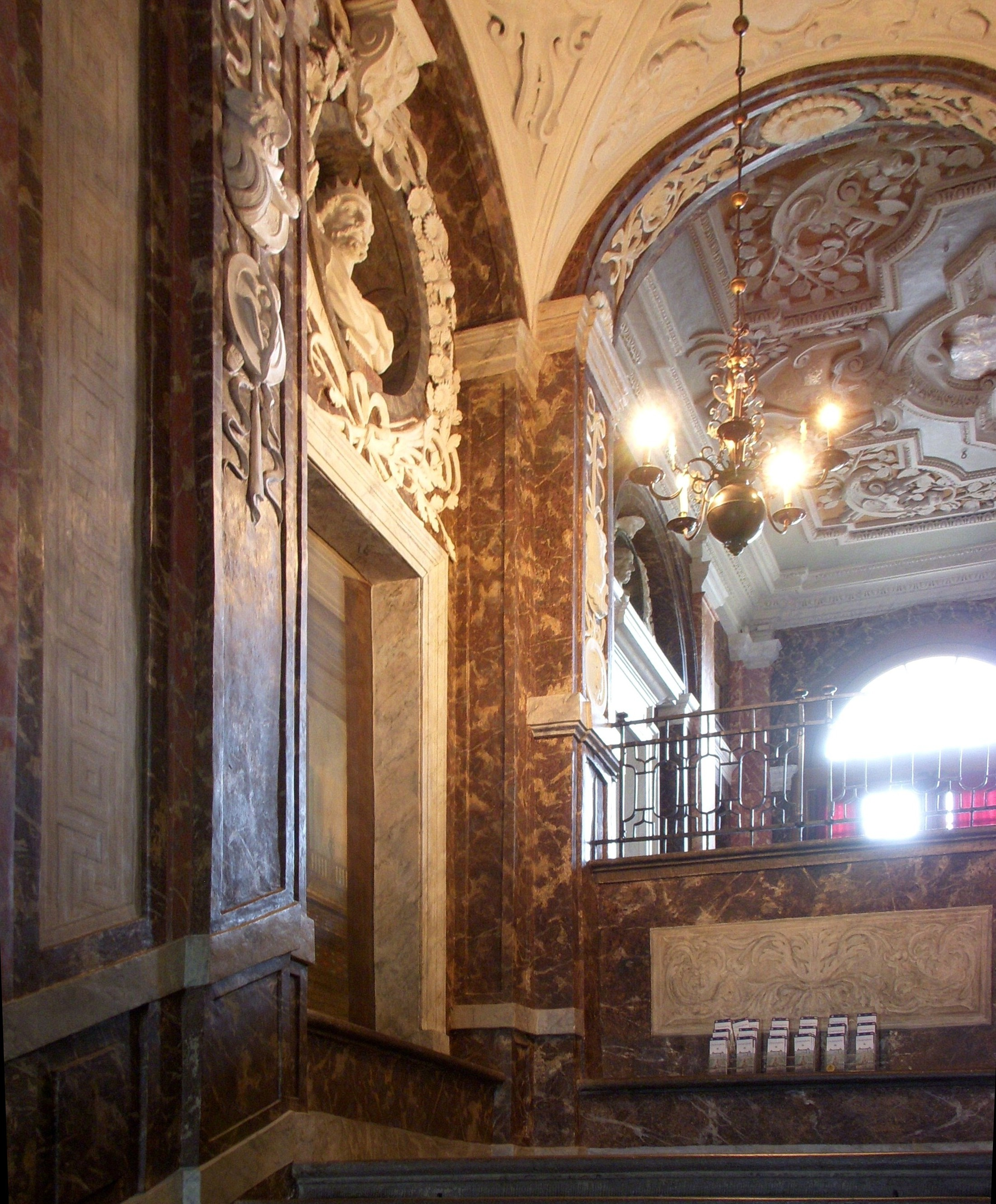 Drottningholms slott, trapphus